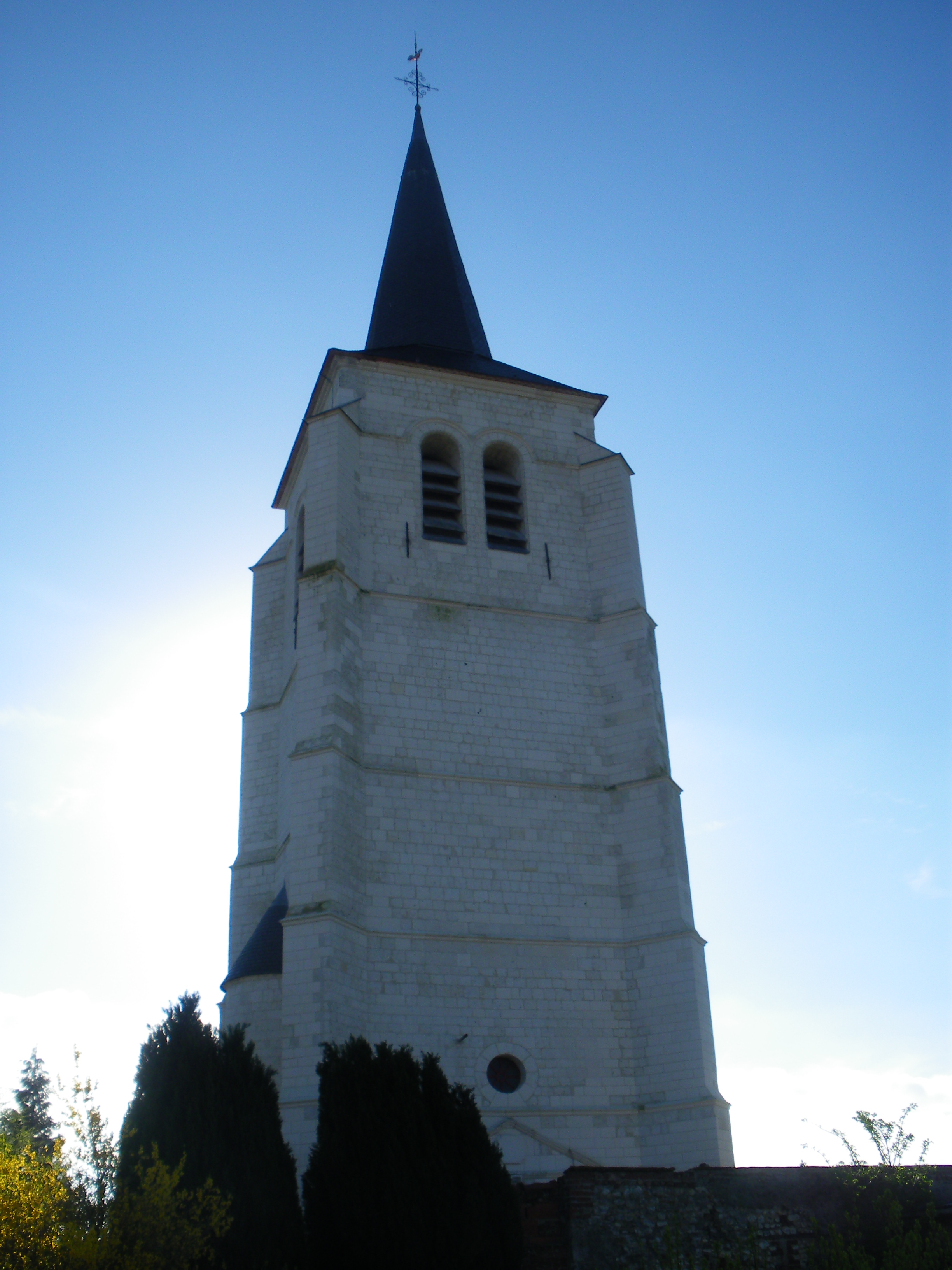 Vue de l'église Saint-Barthélémy d'Humbercamps.